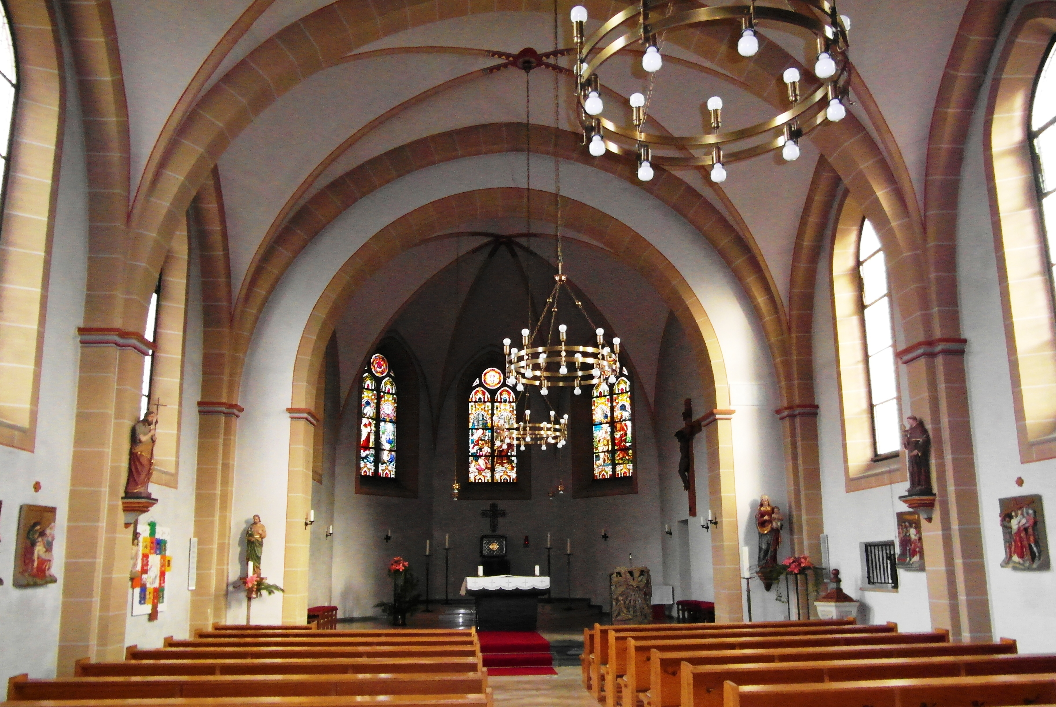 St. Johannes Baptist Serkenrode, Innenansicht